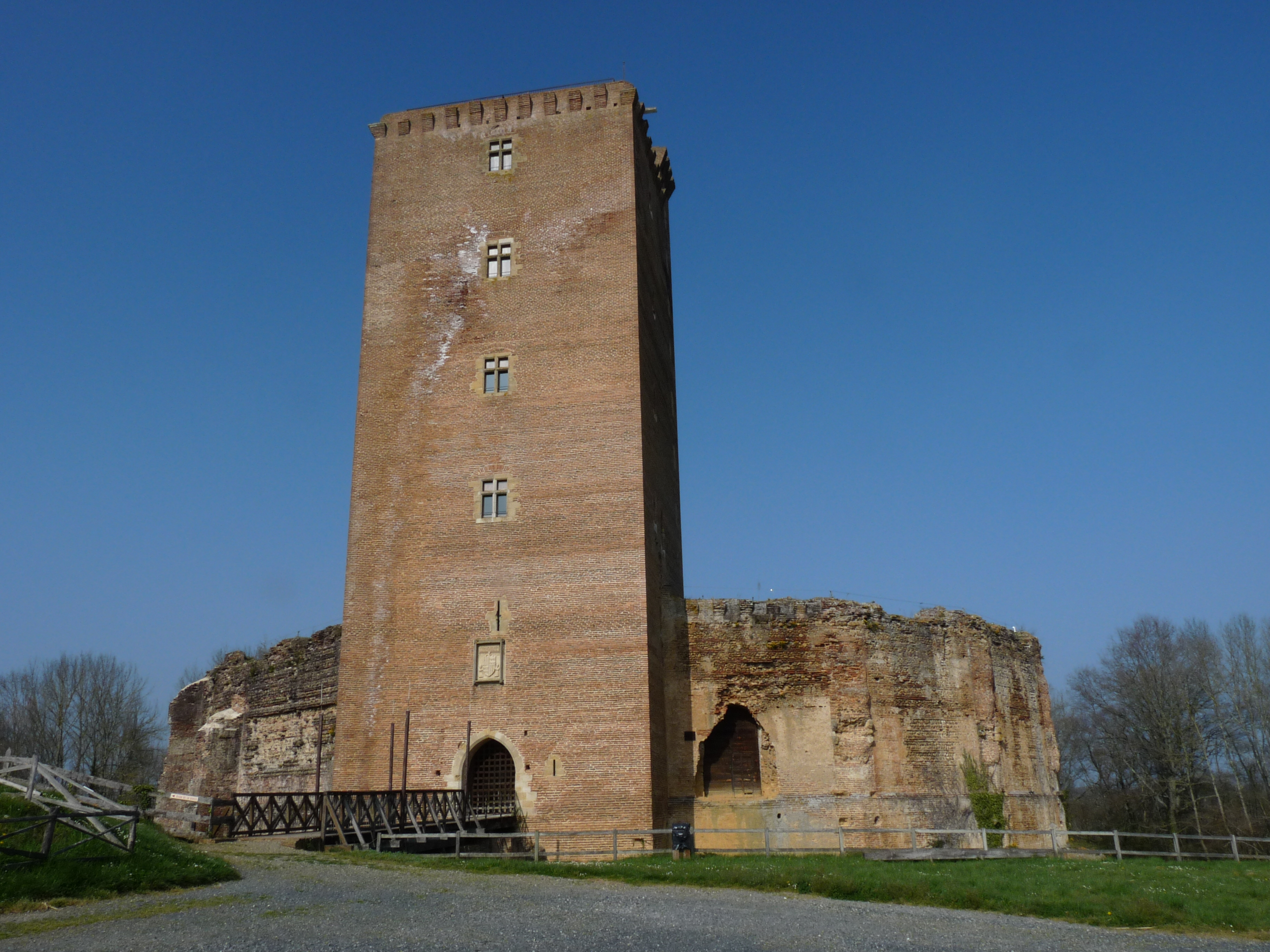 Château de Montanerdonjon, enceinte L'enceinte est en galets disposés en arête-de-poisson alternant avec des rangées de briques posées à plat.